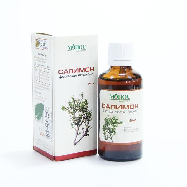 Монгол: Дархлаа сайжруулах бүтээгдэхүүн